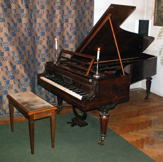 Fortepian J. Budynowicz Warszawa z 1850 r.